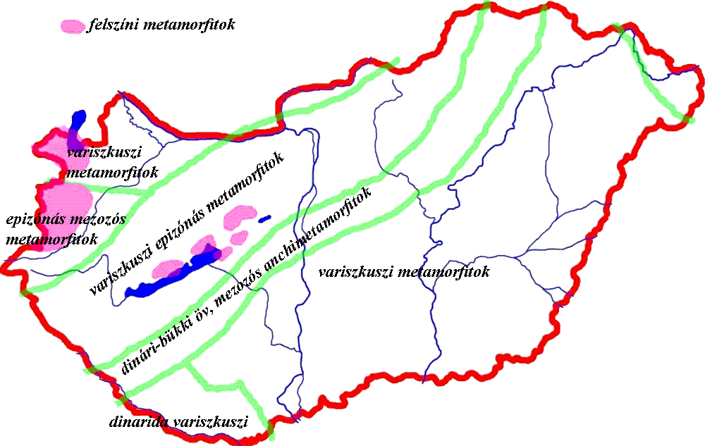 Magyarország metamorf kőzeteinek áttekintő vázlata